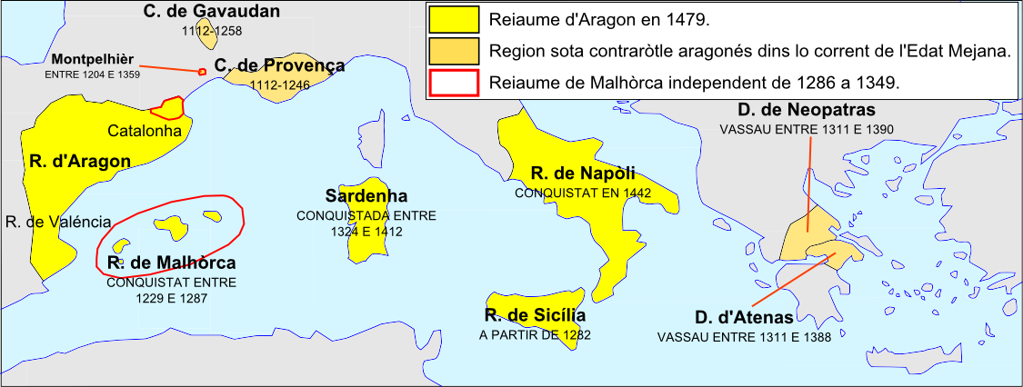 Expansion en Mediterranèa dau Reiaume d'Aragon fins a son union ambé lo Reiaume de Castelha en 1479.